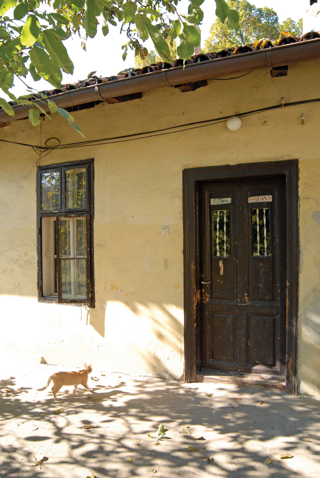 Црквени конак у Топчидеру